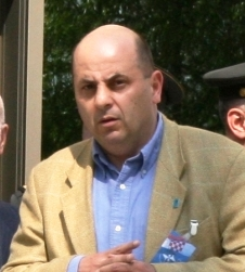 פרופסור איבו גולדשטיין